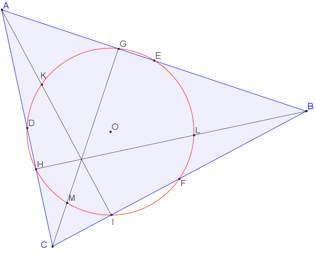 файл выполнен в среде GeoGebra